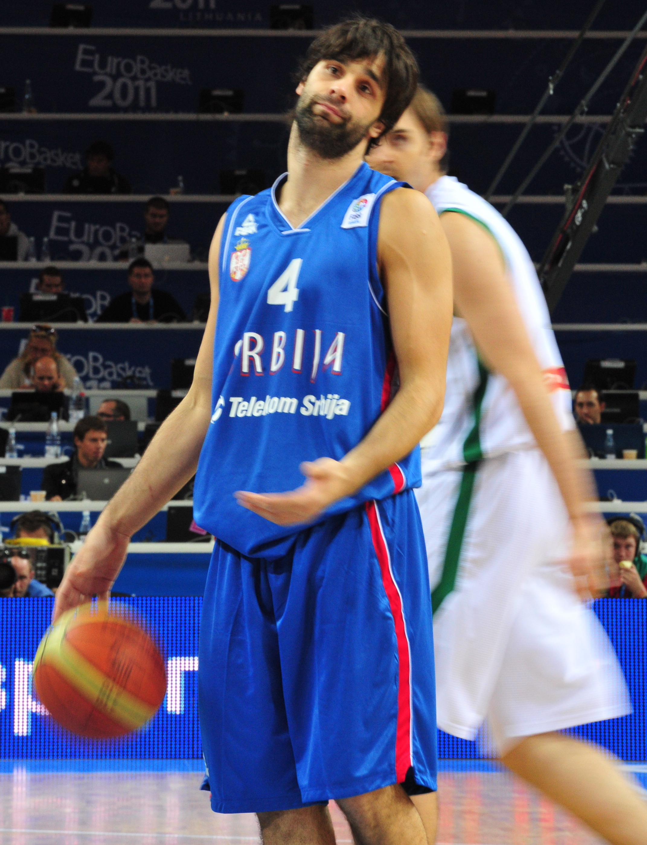 Miloš Teodosić of Serbia at Eurobasket 2011.